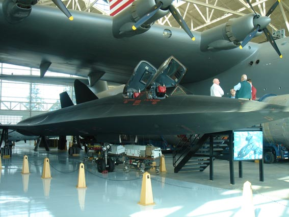 H-4 Rumpfstück und Flügel mit Motoren im Museumshangar, unter dem Flügel SR 71 Blackbird Sonstiges: vollständig wiederaufgebaut